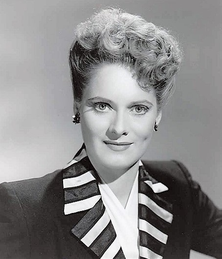 Stephanie Bachelor